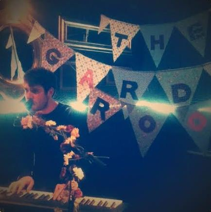 Nacho Nine Stories